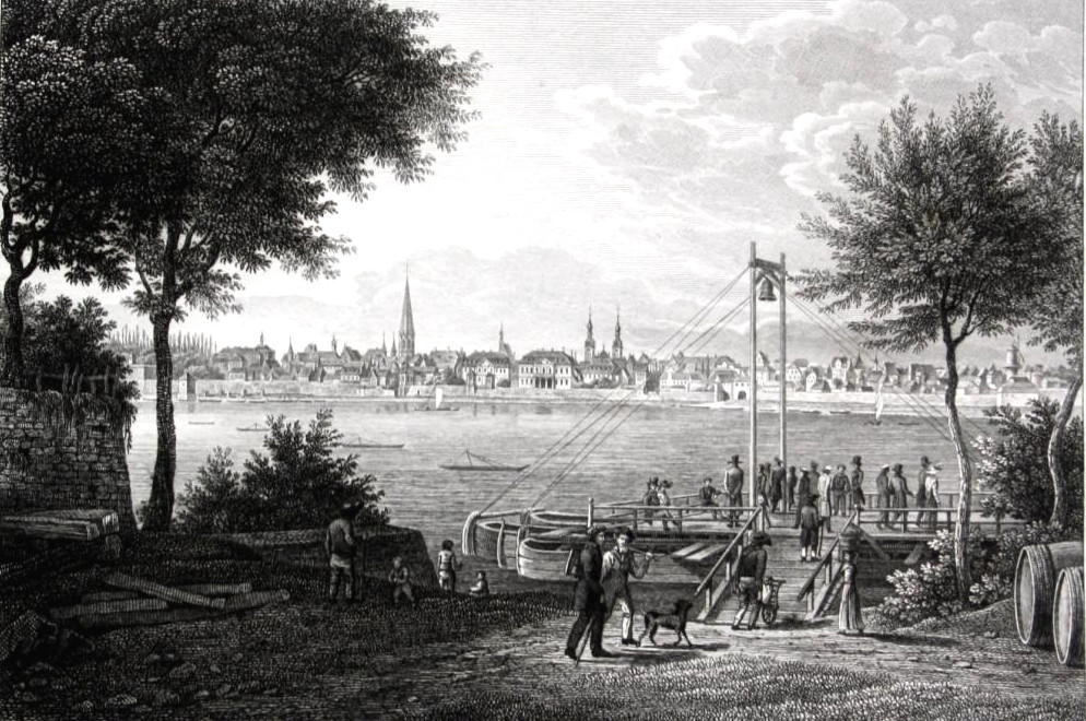 Gierponte von Beuel nach Bonn. "Die Alte 'Fliegende' Gierfähre" am Beuler Ufer vor dem Bonner Panorama. Lithografie (Ausschnitt) von Schnell nach einer Zeichnung von C. Fries.